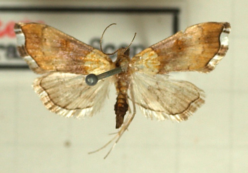 Agrotera nemoralis